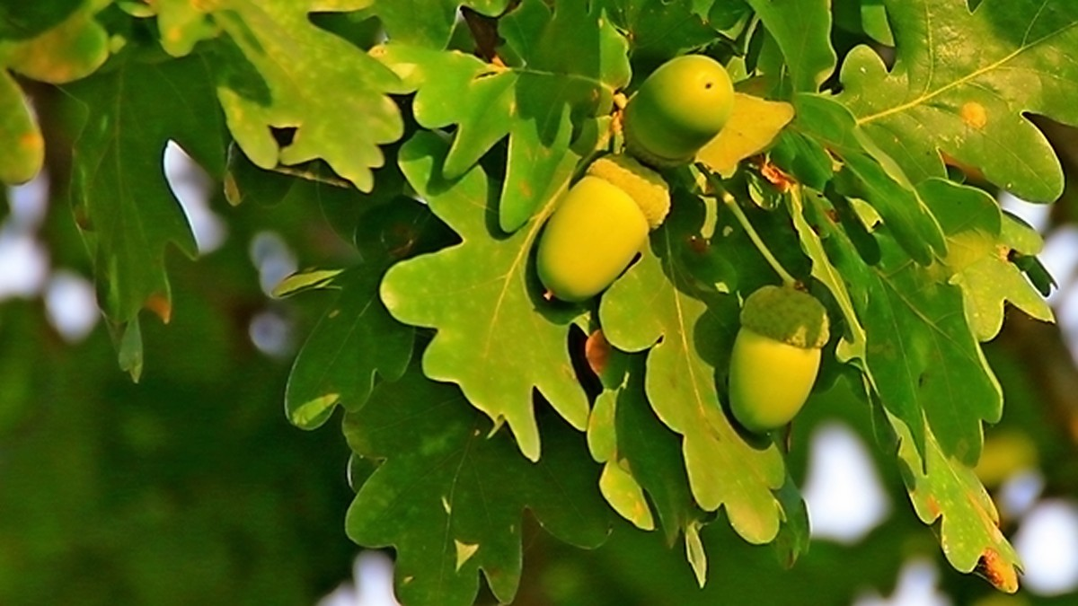 Eicheln einer Stieleiche in Ivenack